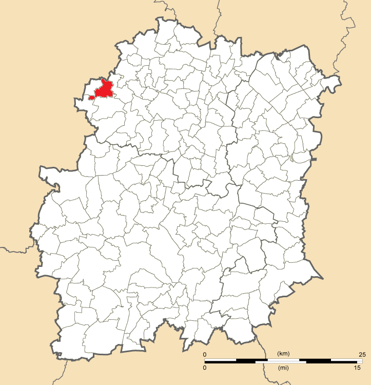 Carte de position des Molières en Essonne (91)